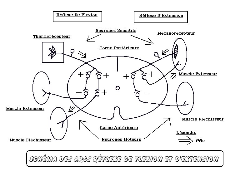 Réflexes de flexion et d'extension Source: Françoise Del Socorro, 7 Août 2004 Licence: GFDL Storm 10 aoû 2004 à 11:40 (CEST)STORM Françoise Del Socorro